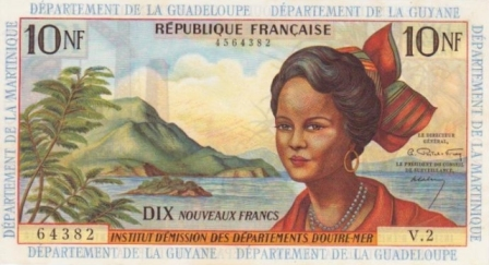 Francia Antillák 10 új frank 1963. Mérete: 150 X 80 mm.